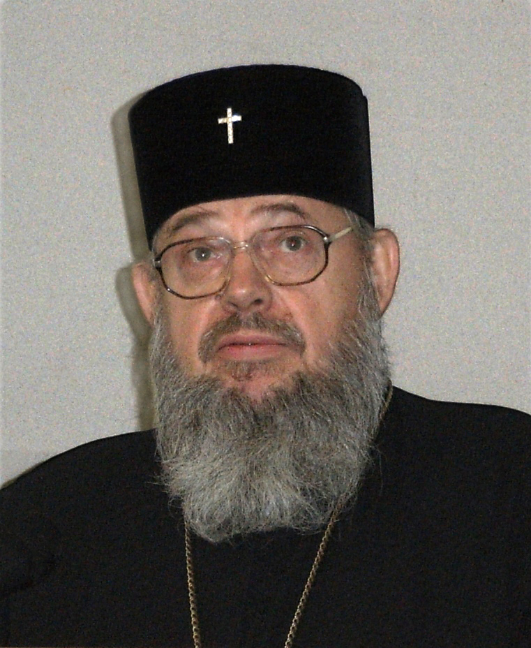 Jeremiasz Anchimiuk beim Vortrag im Ökumenischen Institut am 16. November 2007